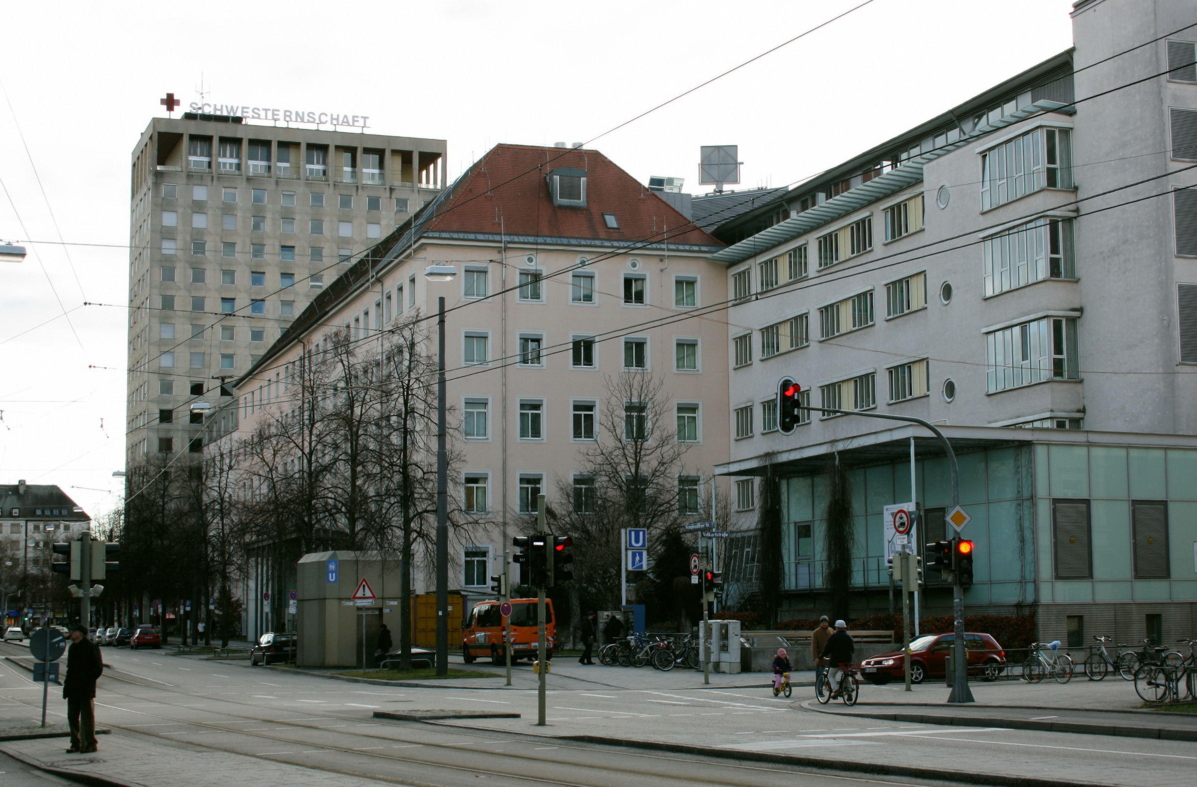 Rotzkreuzklinikum in München